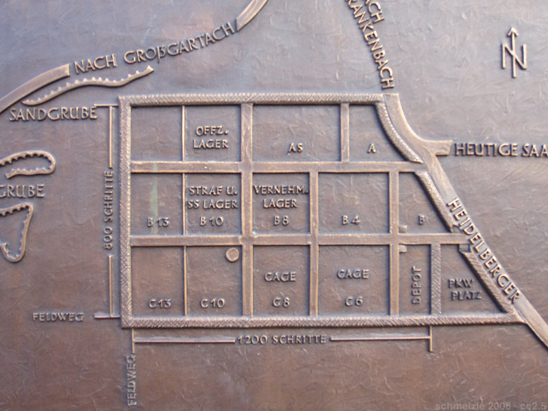 Detail der Gedenktafel für das „Böckinger Lager“ (PWE 10) am Kraichgauplatz in Heilbronn-Böckingen